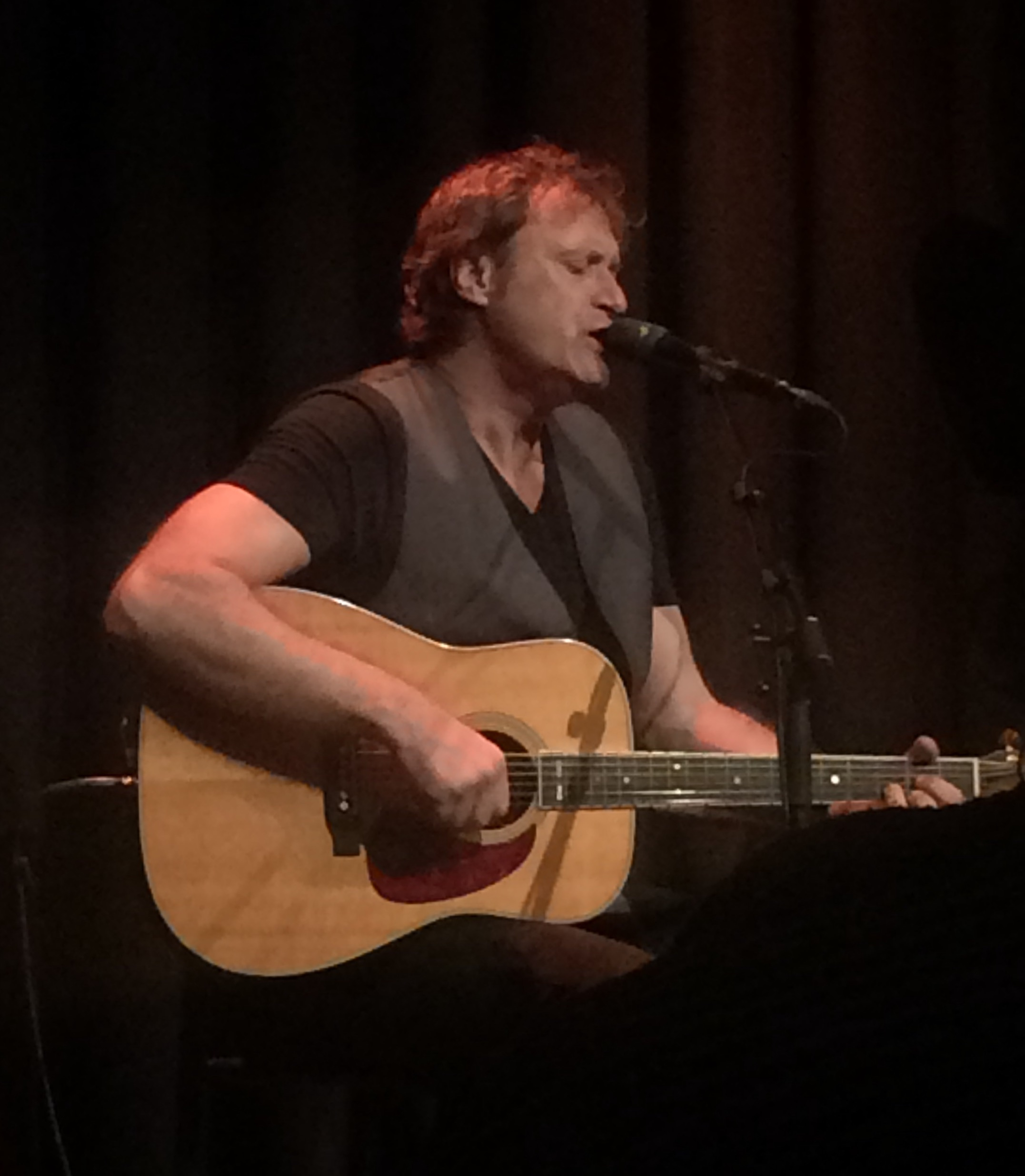 Maarten Peters tijdens een optreden met Margriet Eshuijs in het theater De Tuin te Leusden.